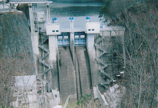 Dam